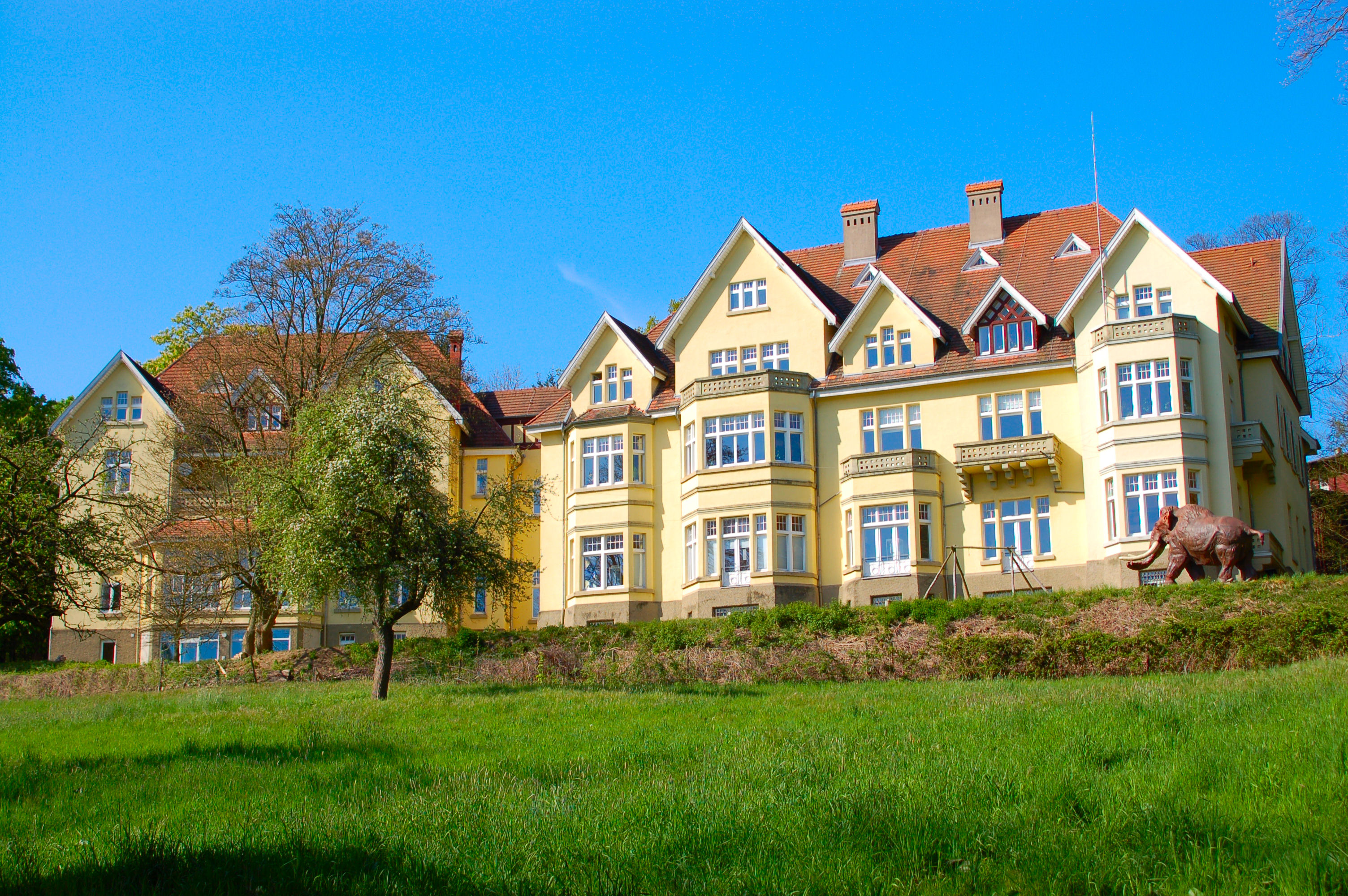 Neuwied/Schloss Monrepos: Villa „Waldheim“ (auch „Palais der Prinzessinnen“), heute MONREPOS Archäologisches Forschungszentrum und Museum für menschliche Verhaltensevolution